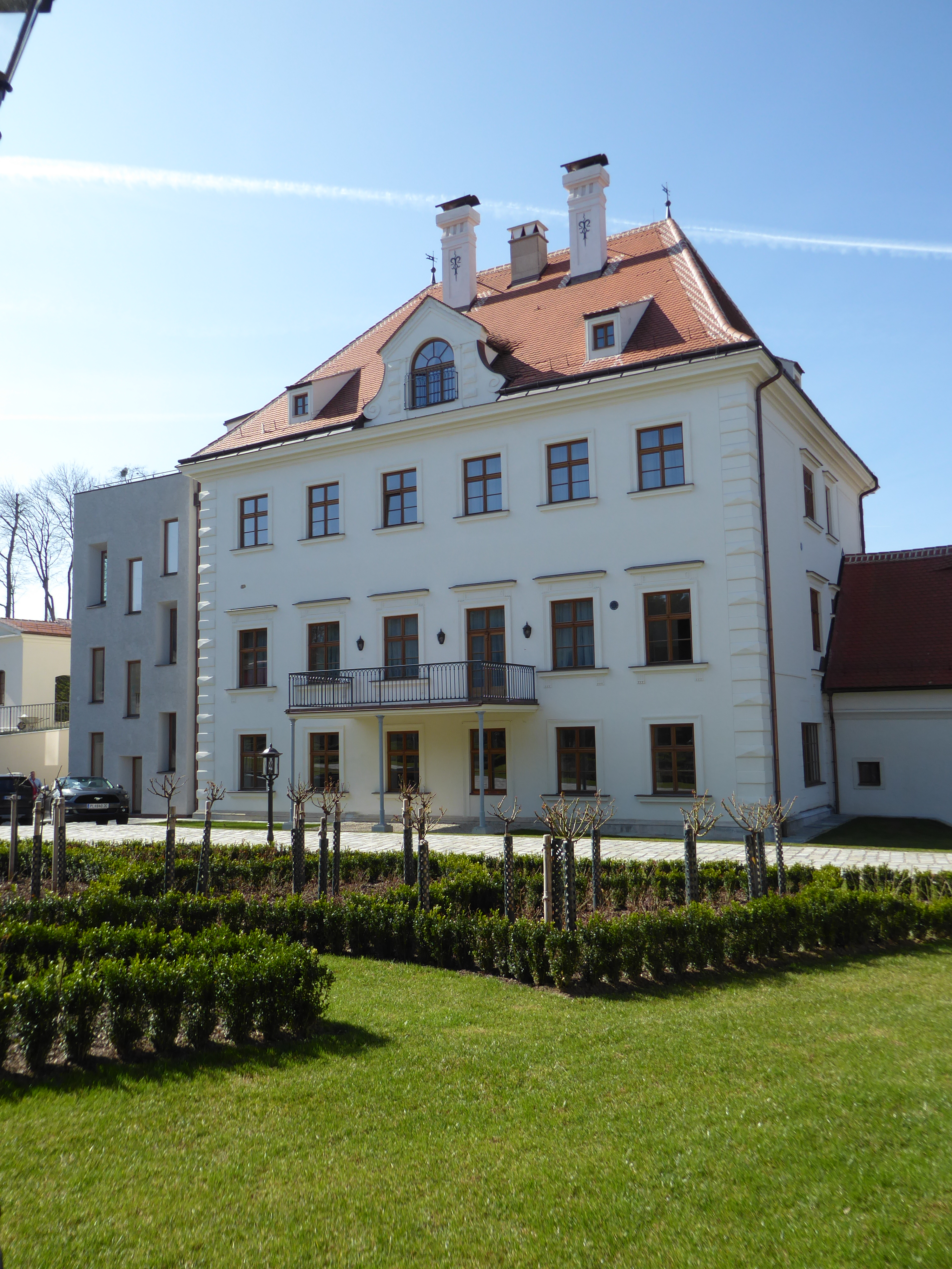 Schloss Thalheim, Thalheim 22, Kapelln, Niederösterreich - Ostflügel